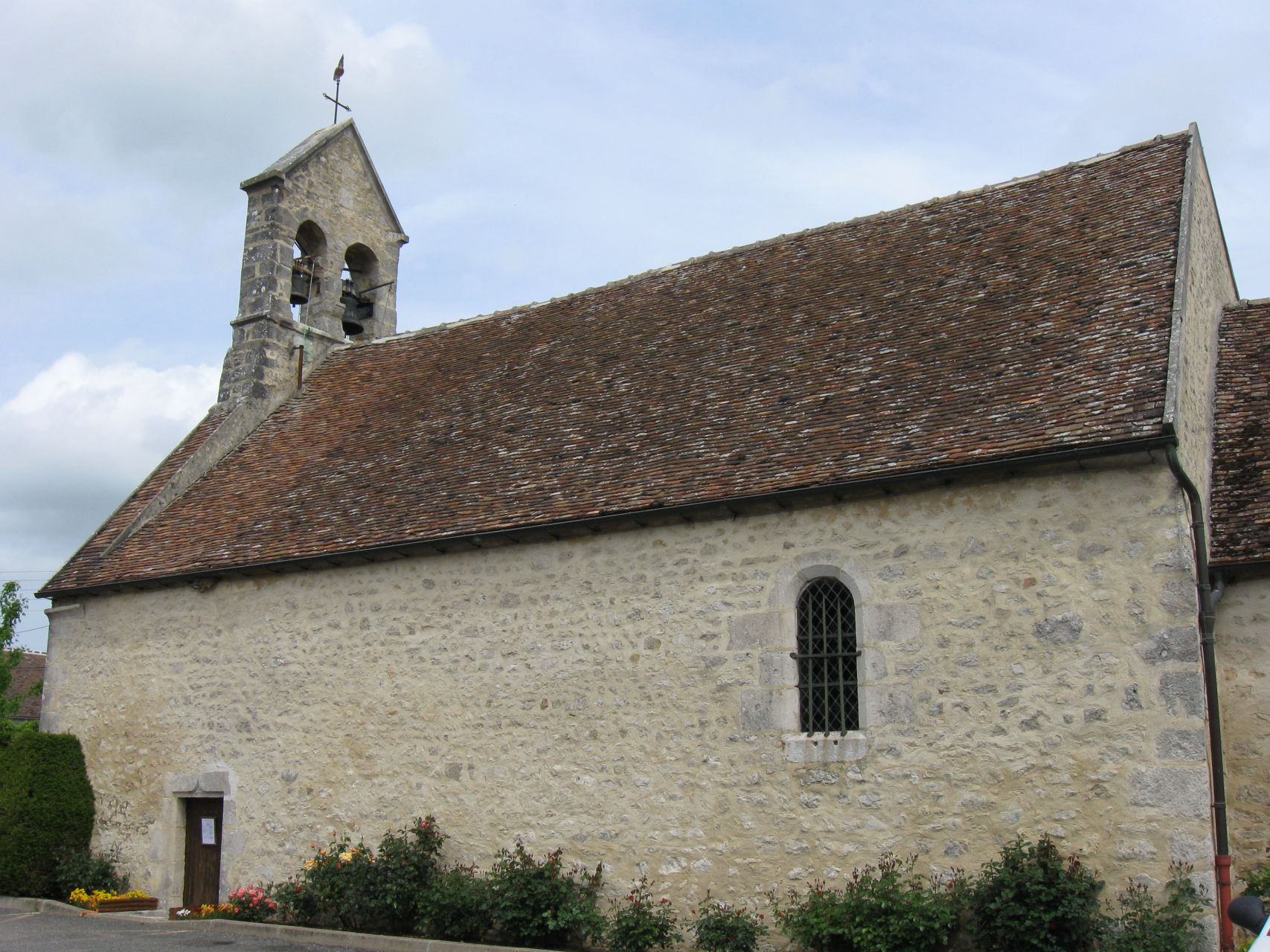 Église Sainte-Marie-Madeleine (La Madeleine-sur-Loing, Seine-et-Marne, région Île-de-France)